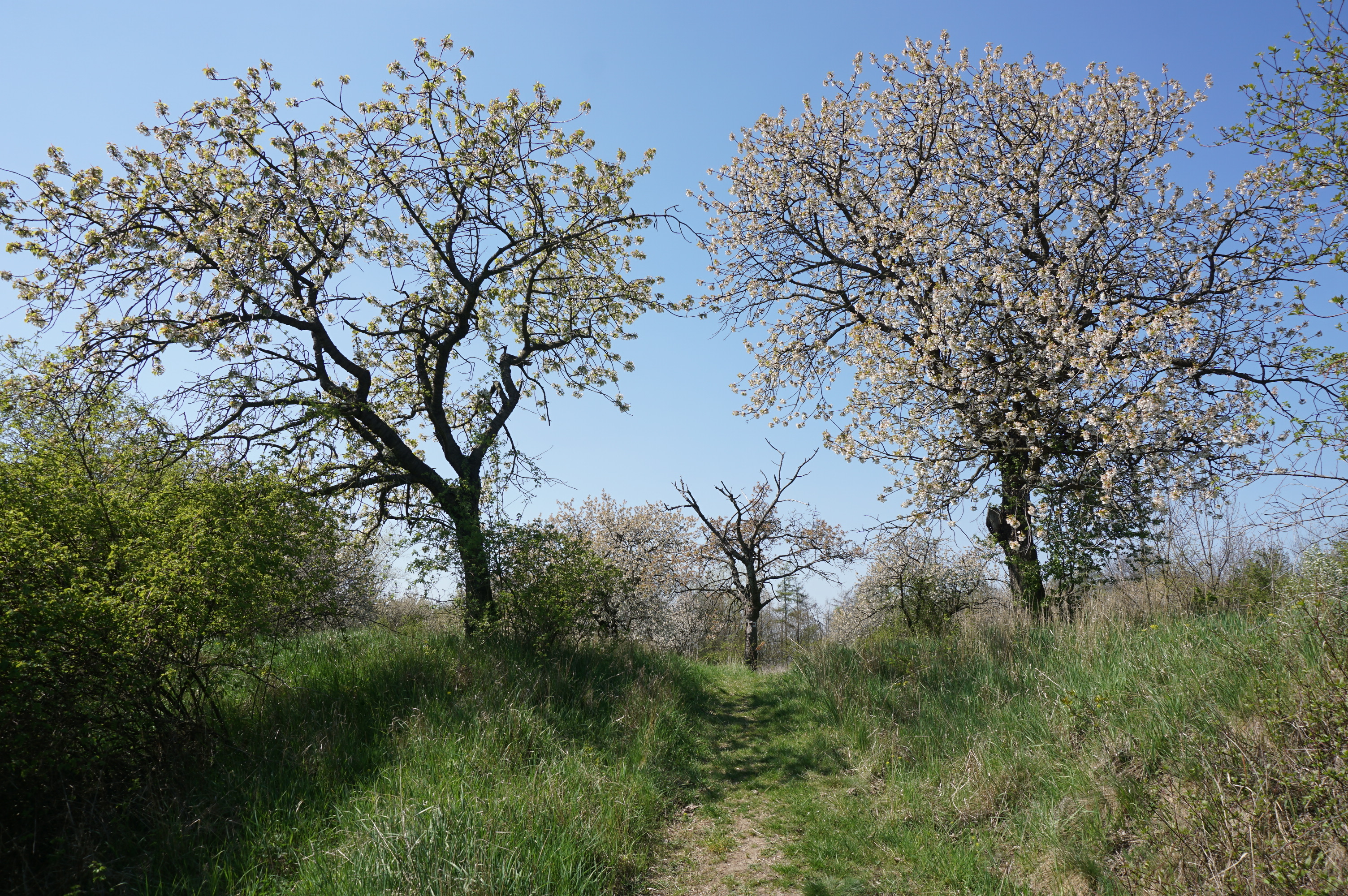 Hrad Chlum, východně od vsi, Nepřevázka.